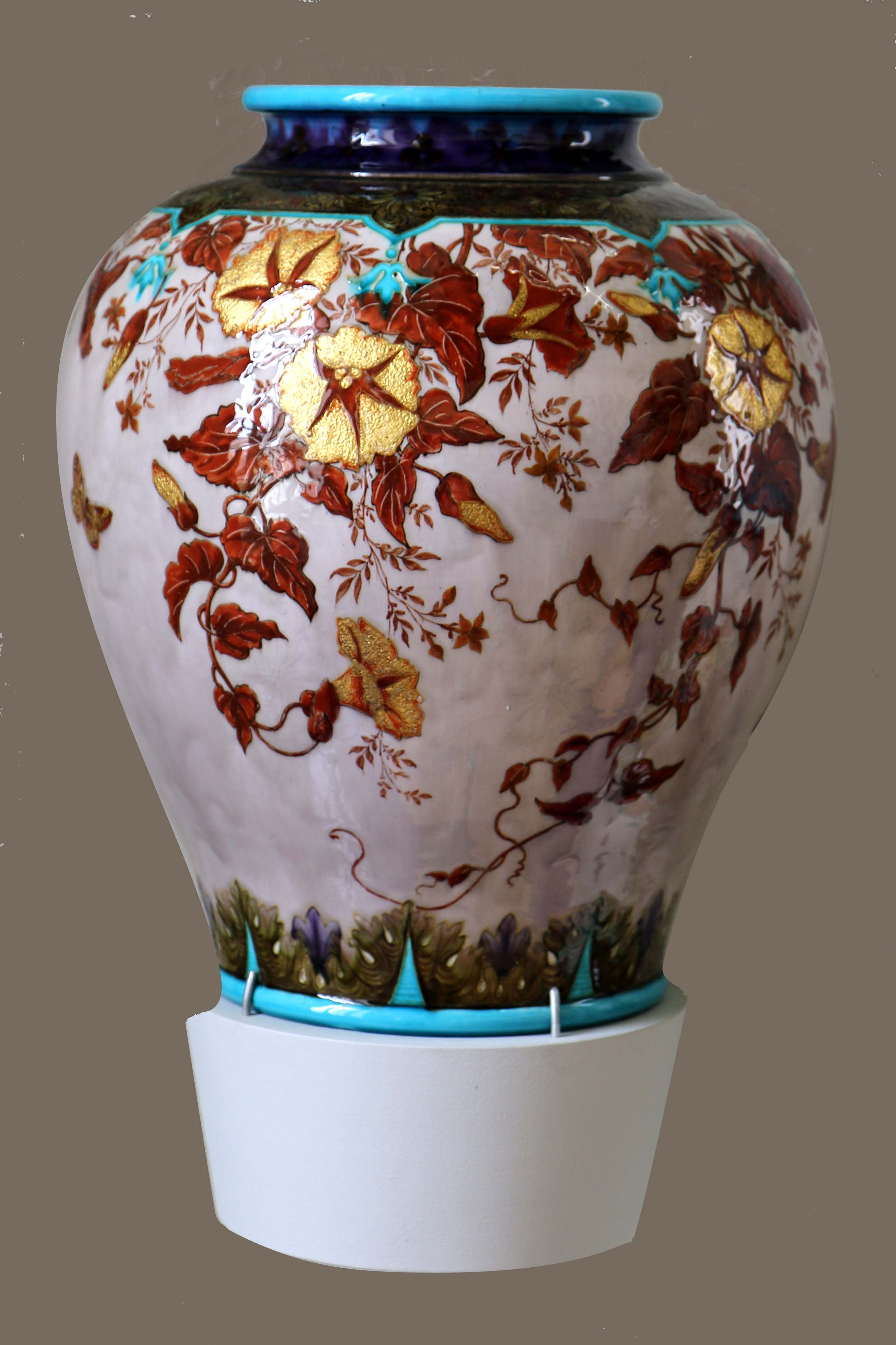 Vase balustre de Théodore Deck . Faïence fine d'émaux polychromes et rehauts d'or. Musée des Arts décoratifs, de la Faïence et de la Mode à Marseille.